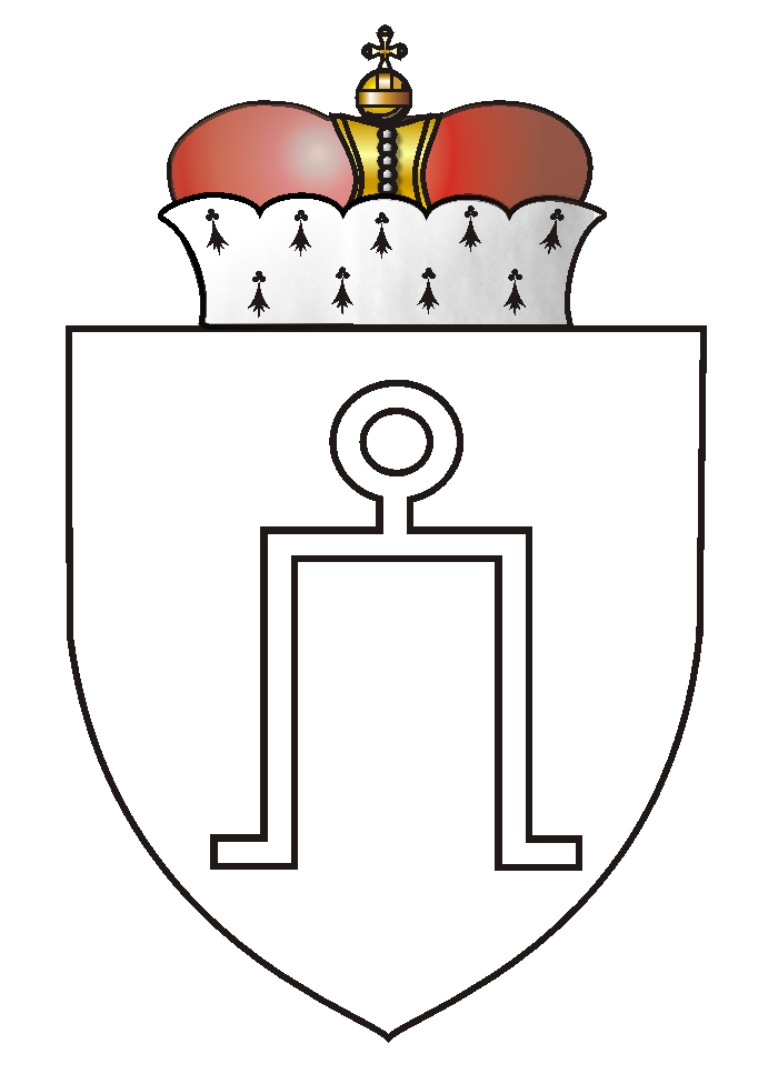 herb tatarskiej rodziny Abrahimowiczów, w wersji z mitrą kniaziowską